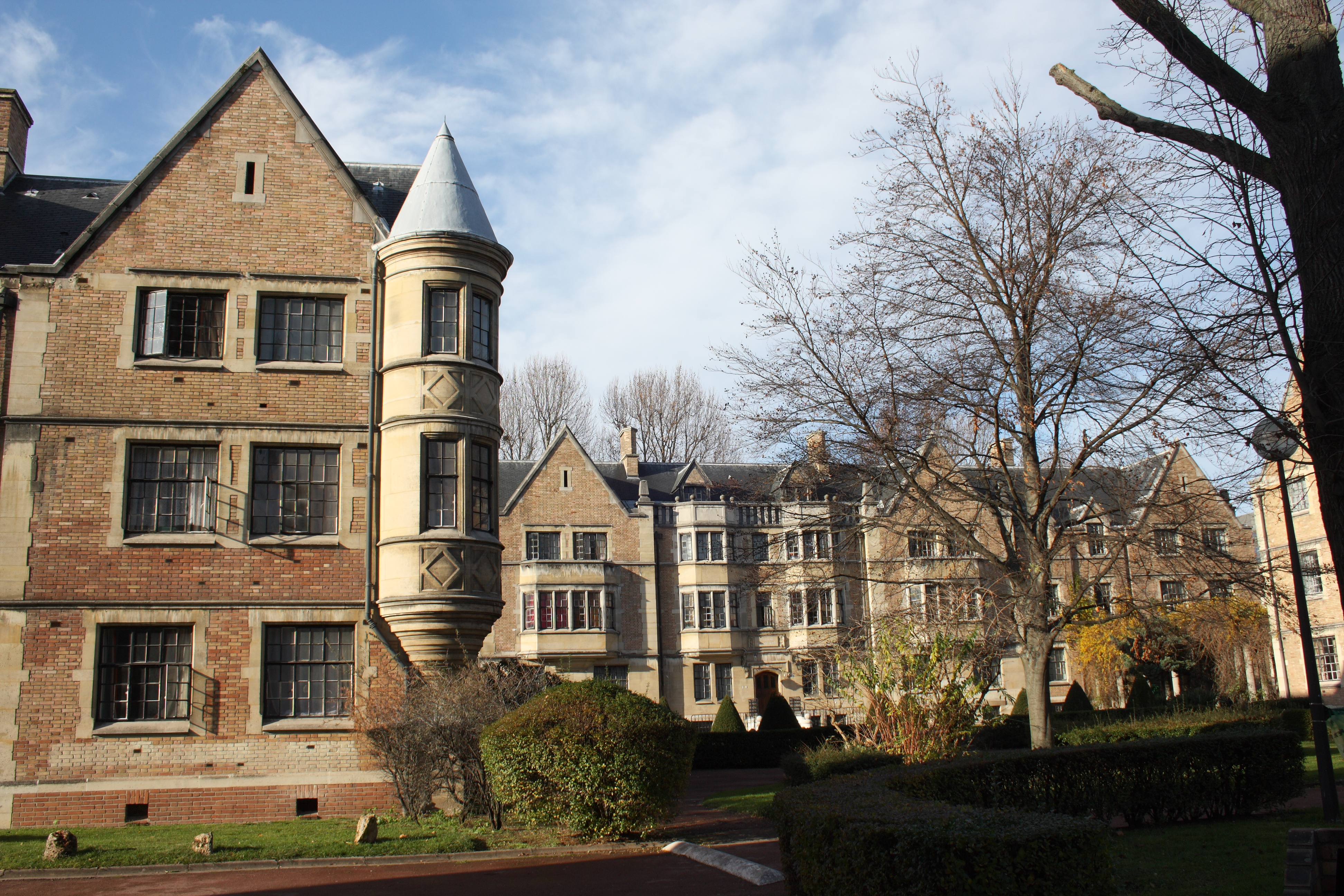 Studentenwohnheim der Fondation Deutsch de la Meurthe in der Cité Internationale Universitaire de Paris, Paris (14. Arrondissement)